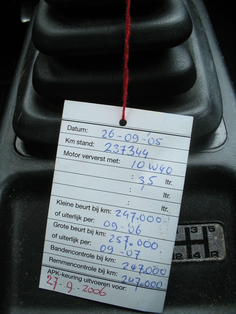 Herinneringslabel onderhoudsbeurten, oktober 2005